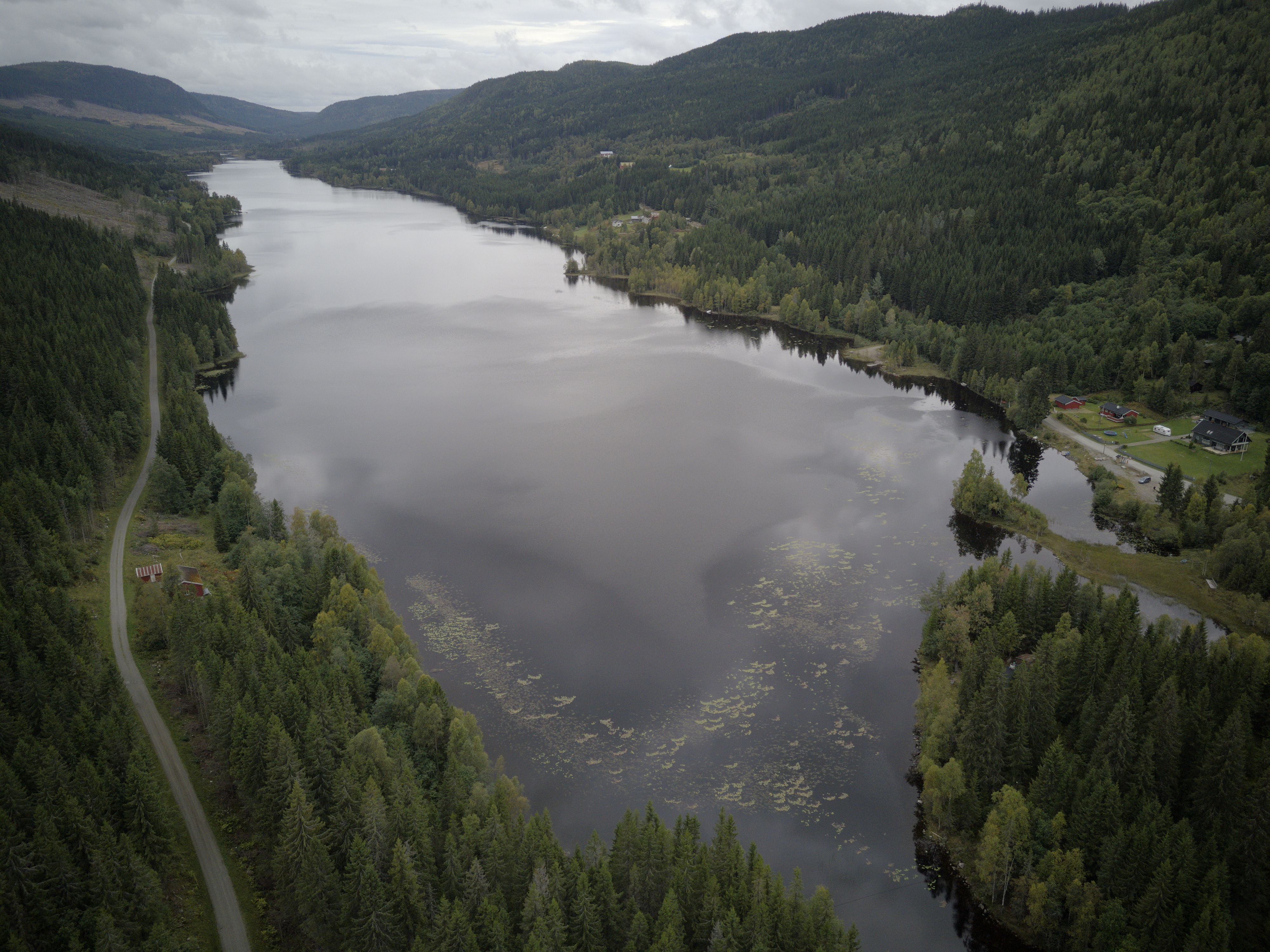 Høversjøen på Østre Toten